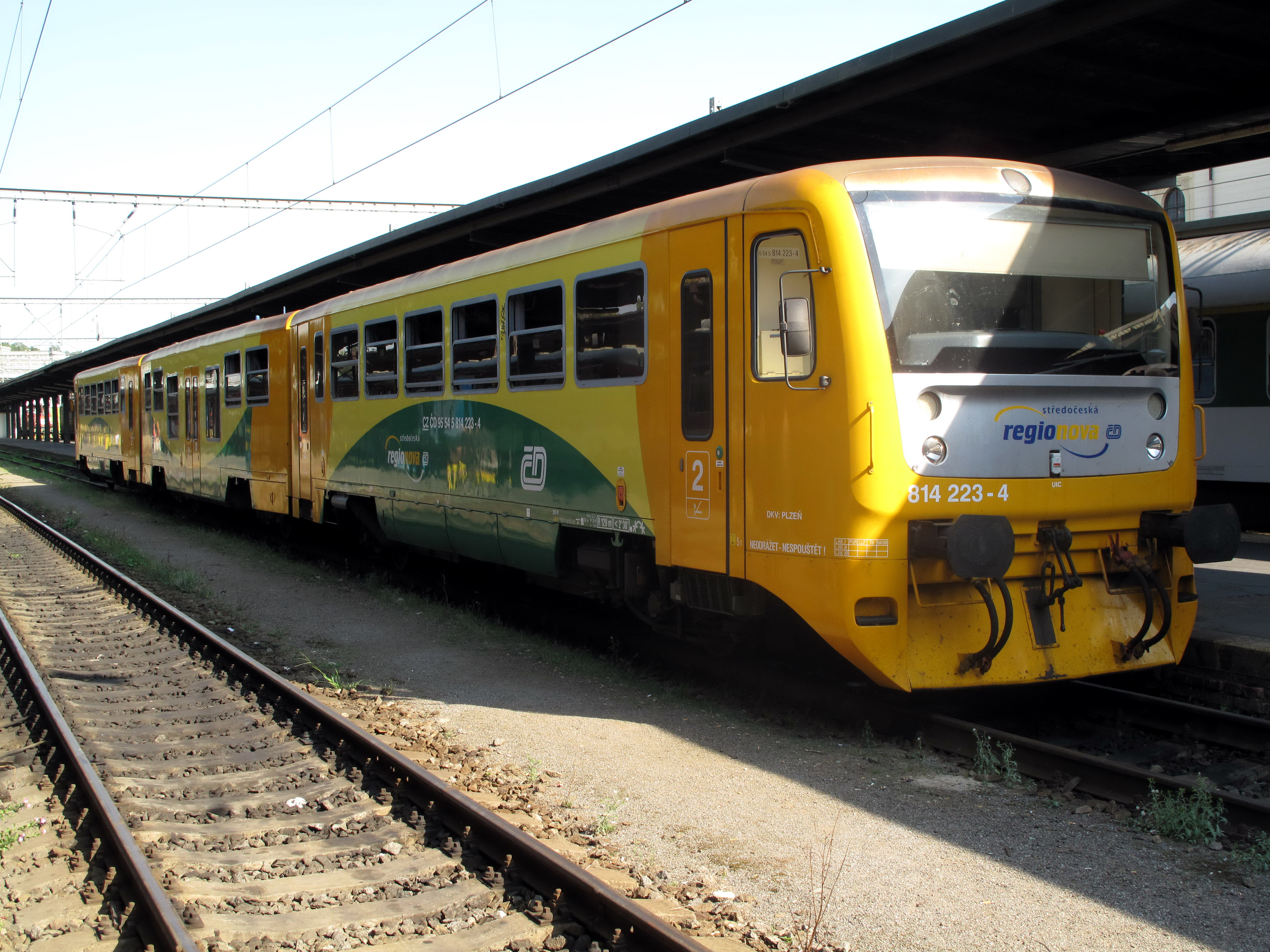 Regionova na Masarykově nádraží